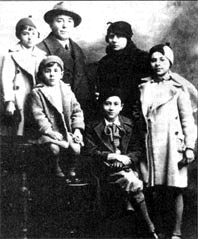 Foto che ritrae Calogero Marrone con la famiglia